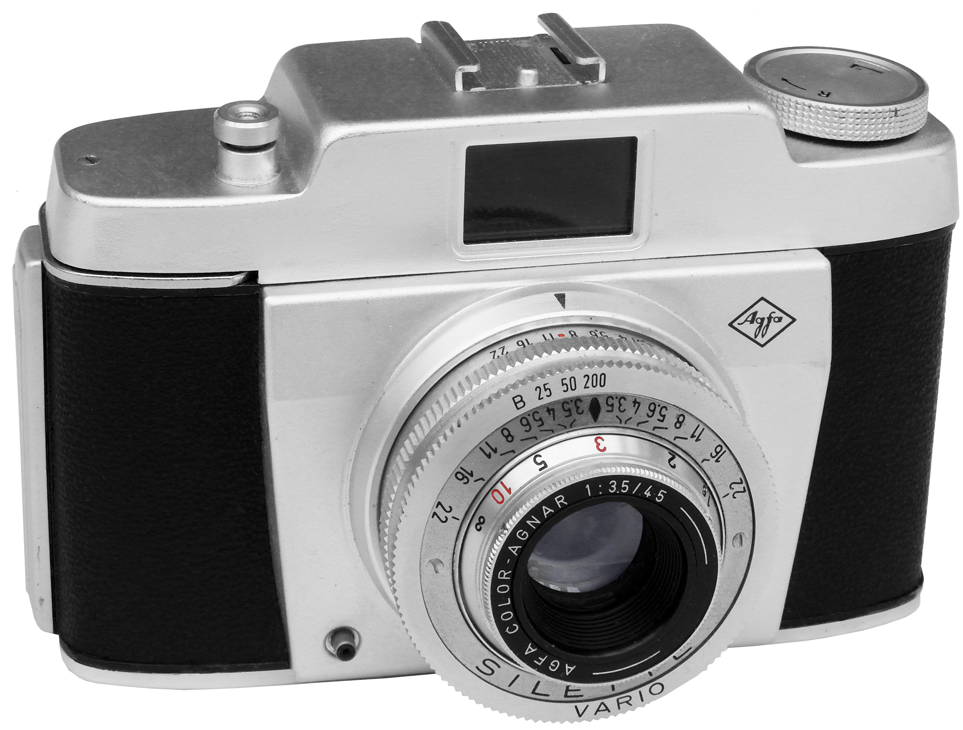 Die Modellbezeichnung "Silette Vario" ist kein offizieller Name und bezieht sich auf den einfachen Verschluss, den man nur in dieser Silette-Version findet. Da Agfa die verschiedenen Silette-Kameras zunächst ohne eindeutige Bezeichnungen auslieferte, ist eine Zuordnung bei über 30 "Nur"-Siletten einigermaßen schwierig. G. Kadlubek und R. Hillebrand haben ein recht vernünftiges Klassifizierungs-System erstellt, nach diesem gehört diese Silette zum Typ B. Es war die am einfachsten ausgestattete Silette: Der 3-Zeiten-Verschluss Vario und der Dreilinser Agnar waren die Merkmale dieser preiswerten Kamera. Selbstauslöser gab es nicht, aber immerhin Blitzanschluss und Zubehör-Schuh. Der Apparat erschien 1958 und kostete 69,50 DM.